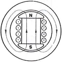 Figura 1. Ligji për forcën magneto-motore i aplikuar në makinën rrotulluese